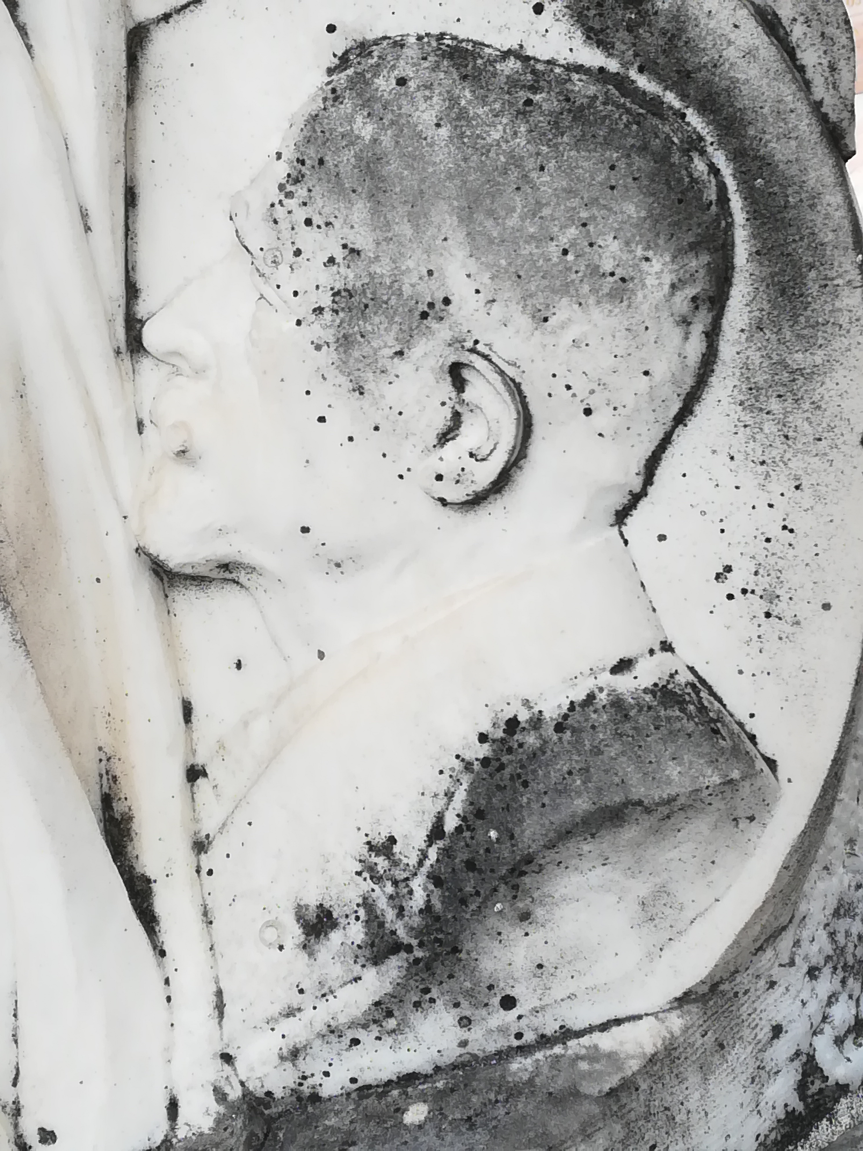 Médaillon représentant Albert Poulain sur sa tombe, au cimetière de Blois.